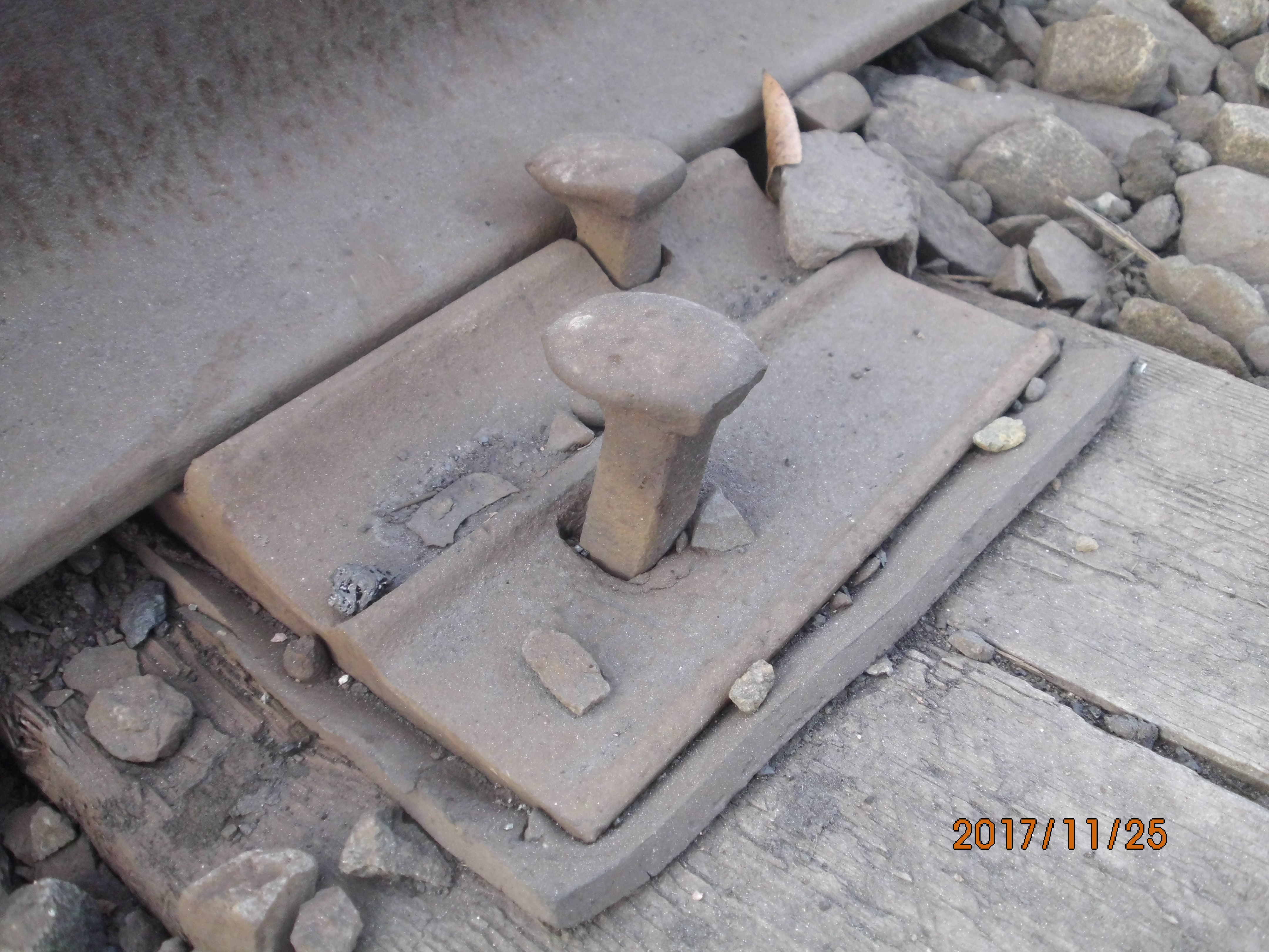 Скрепление рельсов с деревянными шпалами костылями. Вид снаружи колеи.